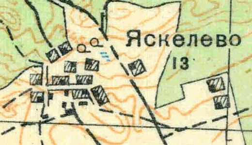 Топографическая карта Ленинградской области, квадрат О-35-24-Б-в (Вохоново), деревня Яскелево